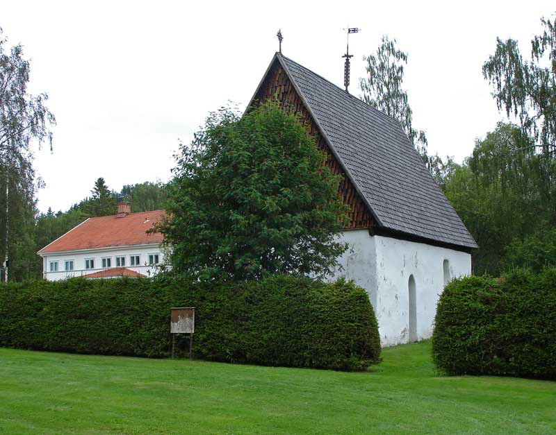 Ramsele gamla kyrka, troligen byggd på 1200-talet. I bakgrunden ses gamla prästgården, numera vandrarhem.